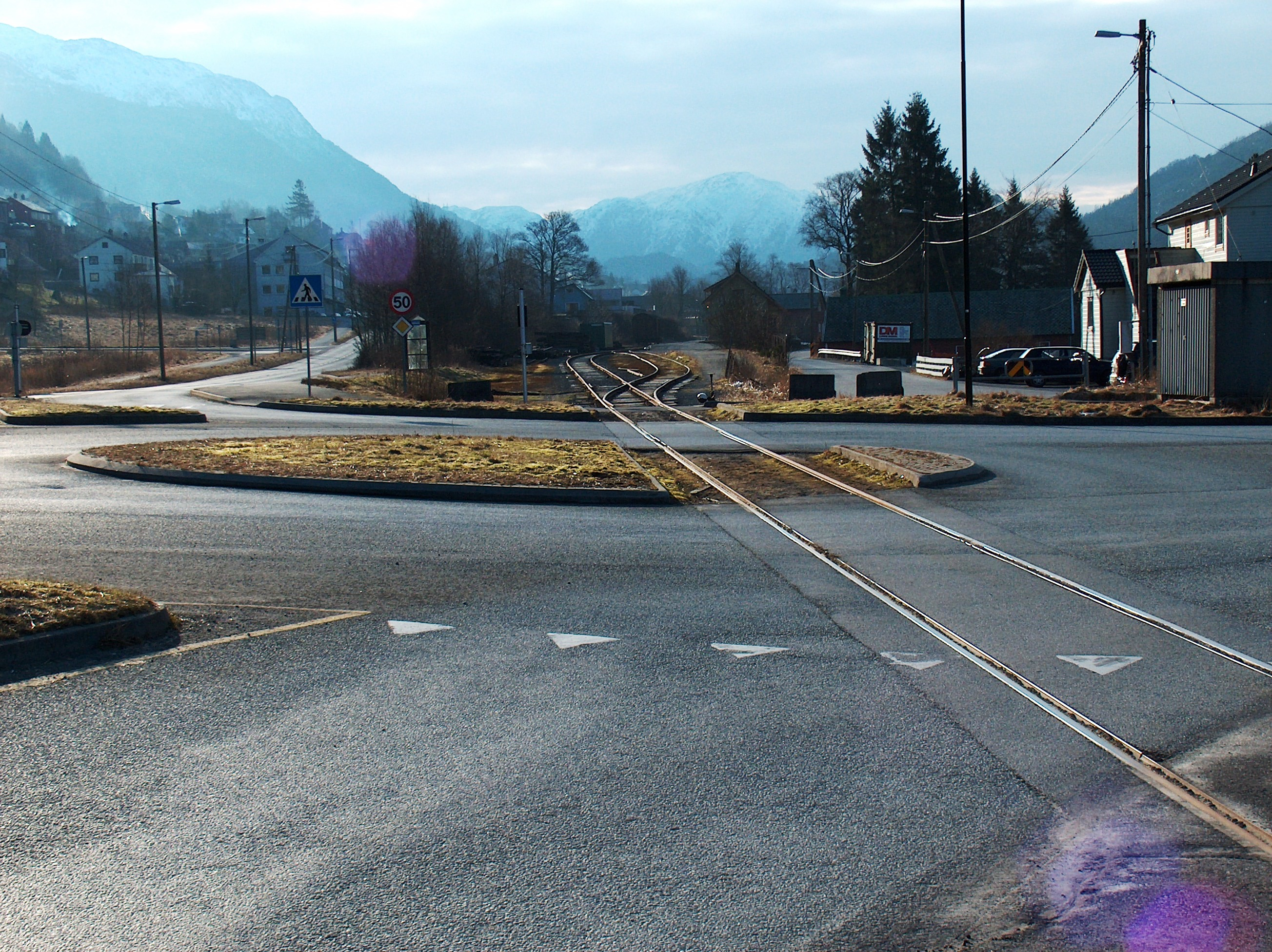 Rundkjøring Indre Arna, Bergen in Norway.